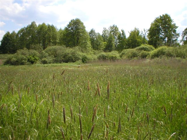 Widok łąk torfowych w okolicy Zbrodów w Wypnisze